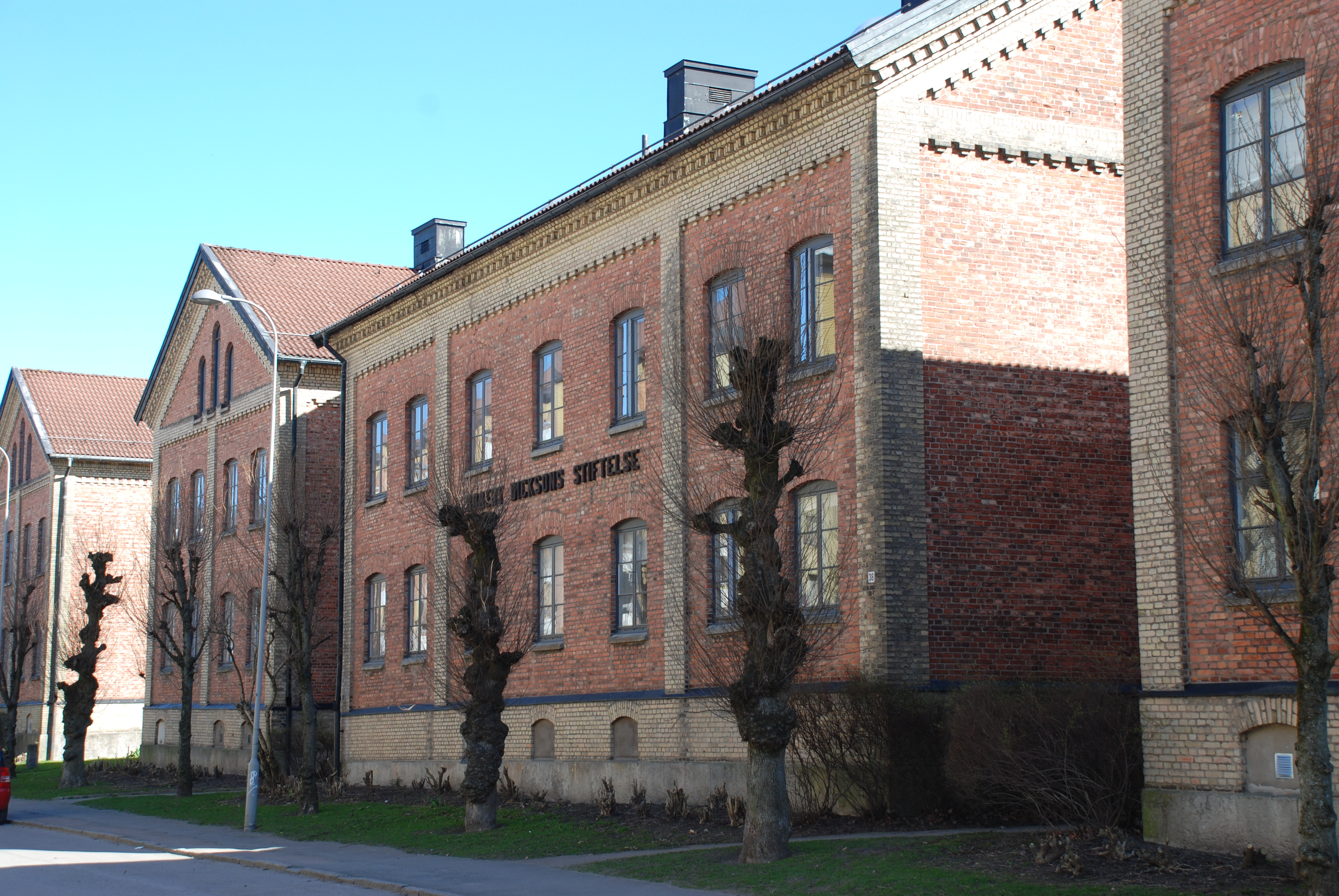 Carl Grimbergsgatan 36-40 i stadsdelen Annedal i Göteborg.